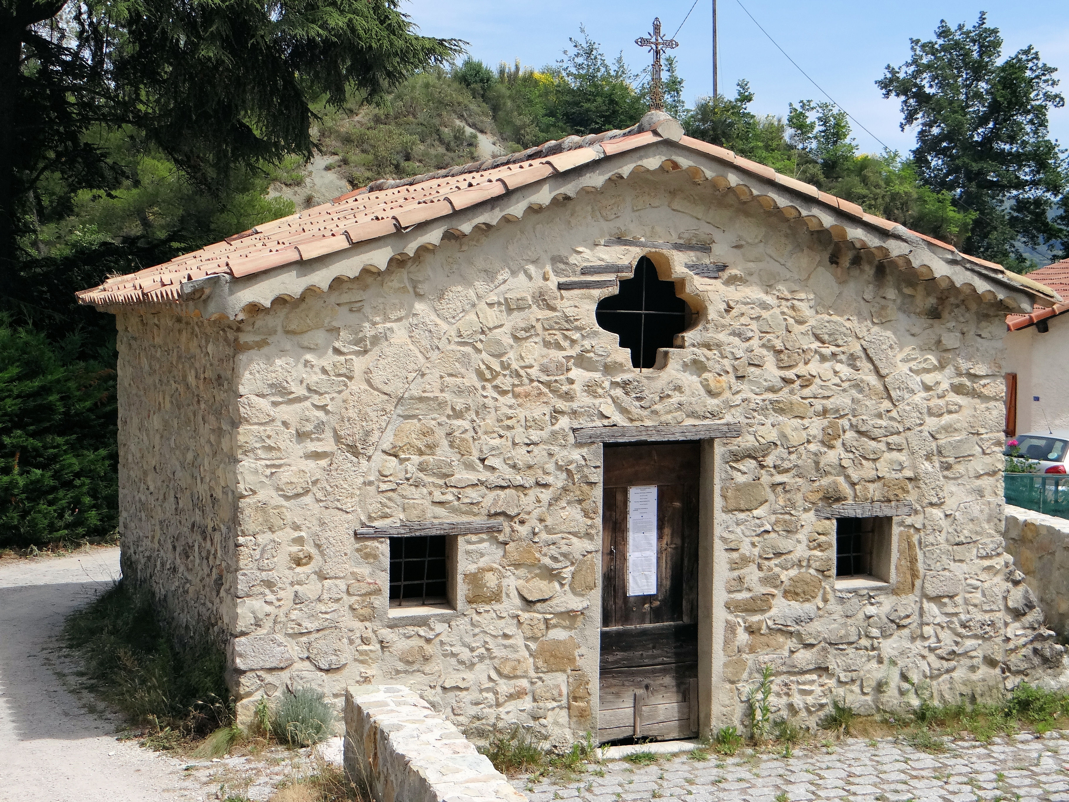 Coaraze - Chapelle Saint-Sébastien - Vue d'ensemble